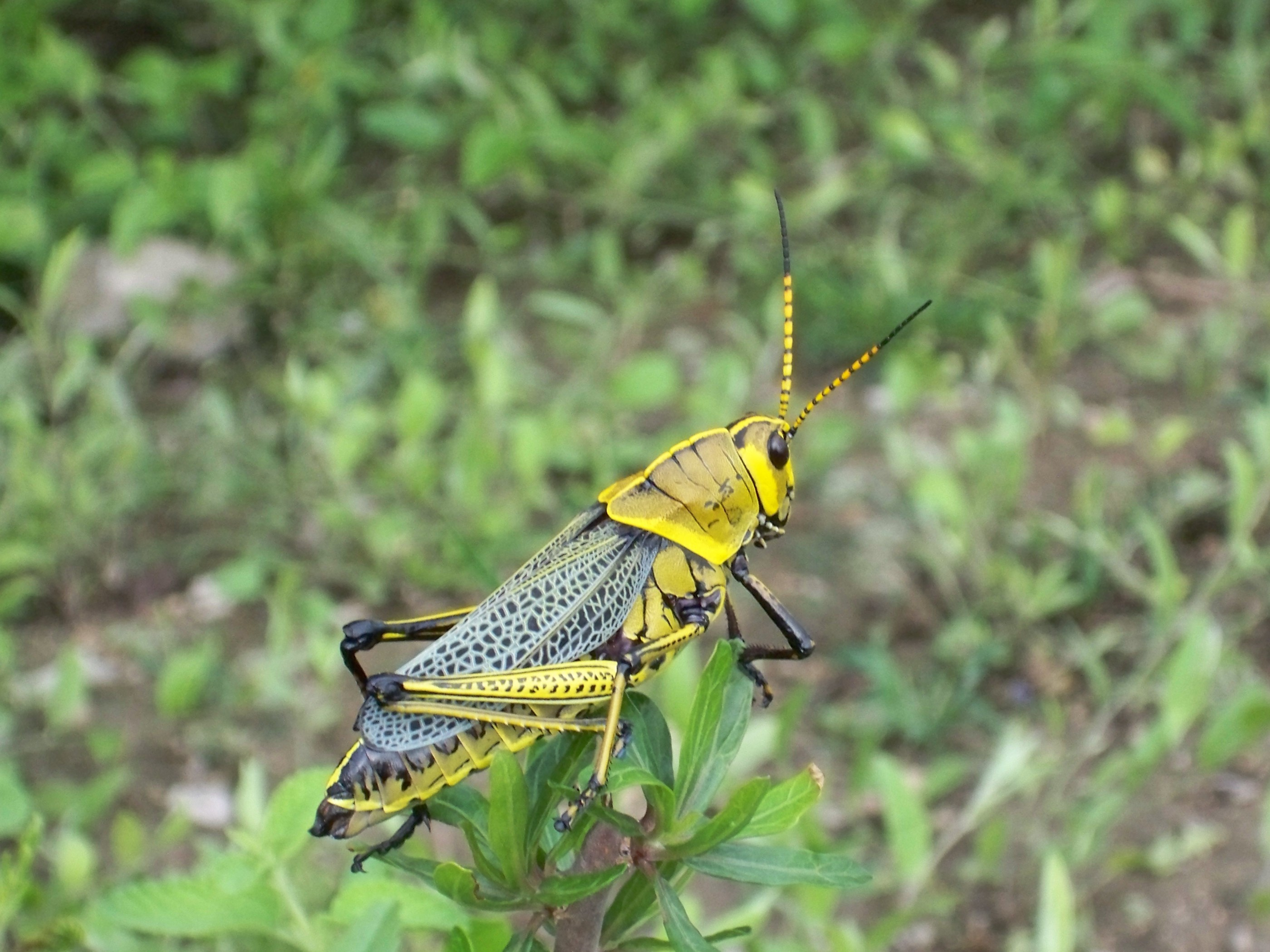 Este insecto "saltamontes" se caracteriza por su belleza y por una peculiar marca que semeja a grafías numéricas